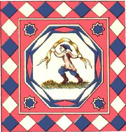 Bandiera della magistratura dei Mattaccini del Gioco del Ponte di Pisa